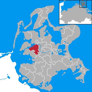 Gingst, Landkreis Rügen, Mecklenburg-Vorpommern